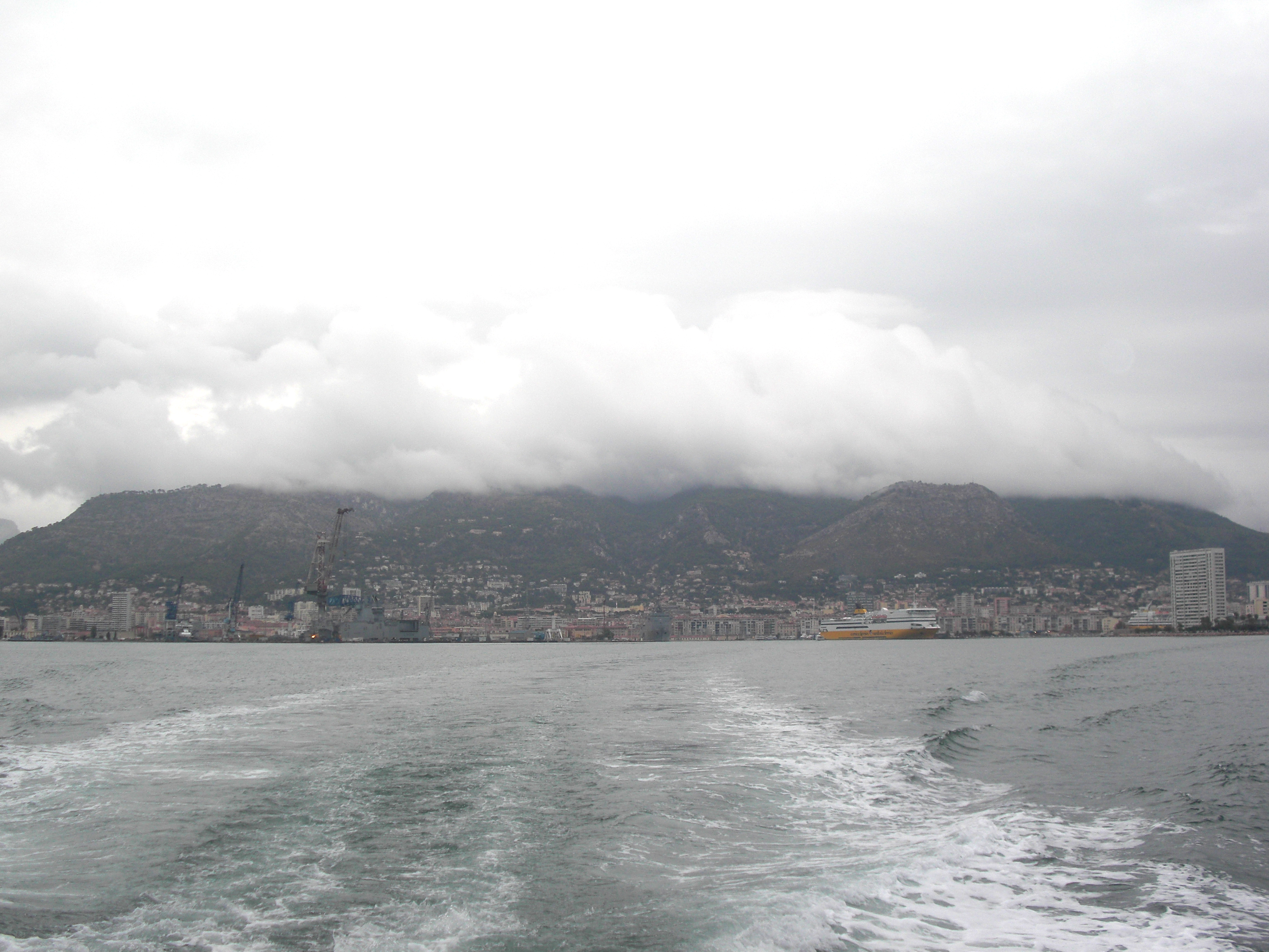 Toulon sous la pluie.